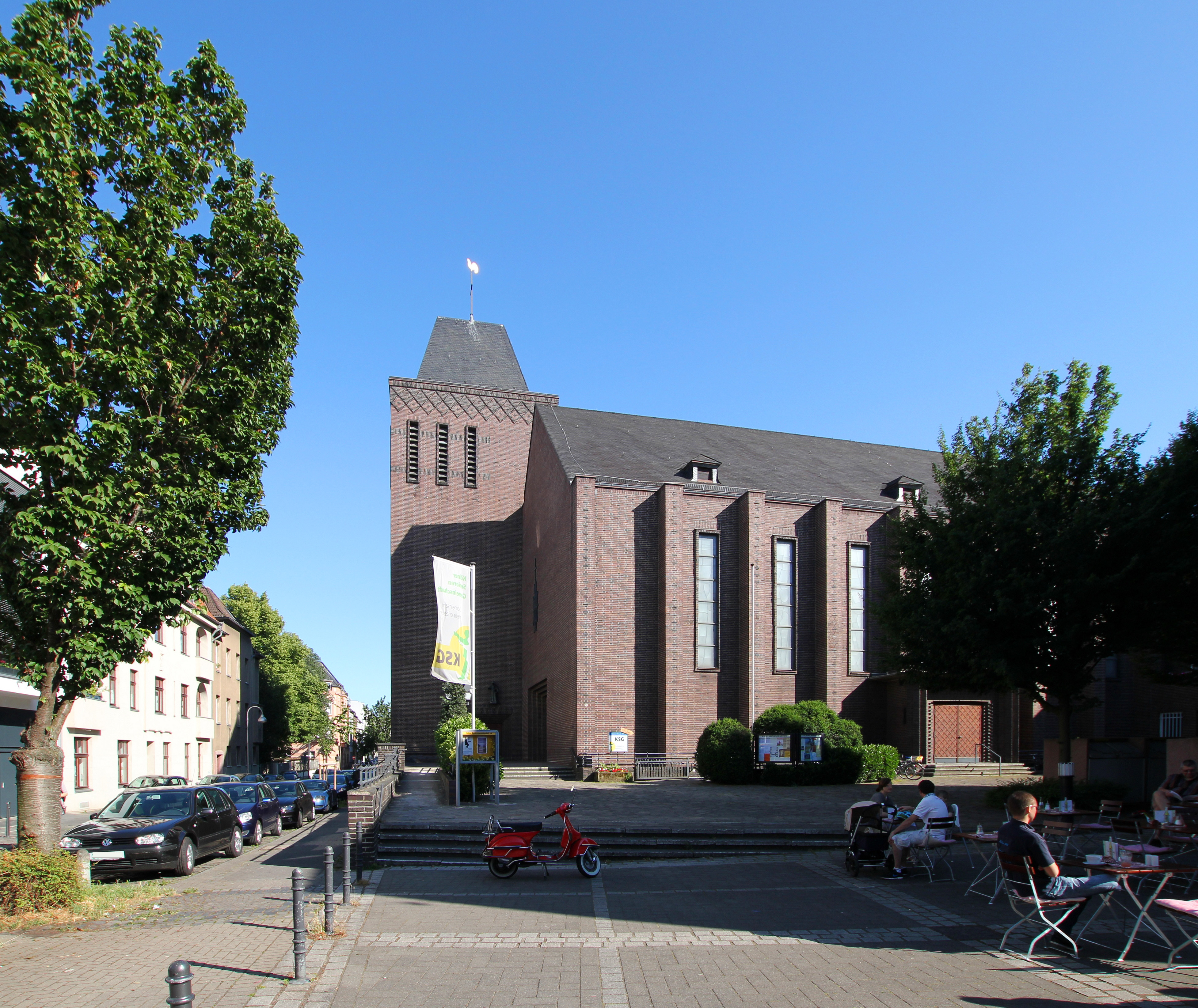 Sankt Karl Borromäus Kirche, Köln-Sülz Redwitzstraße 87